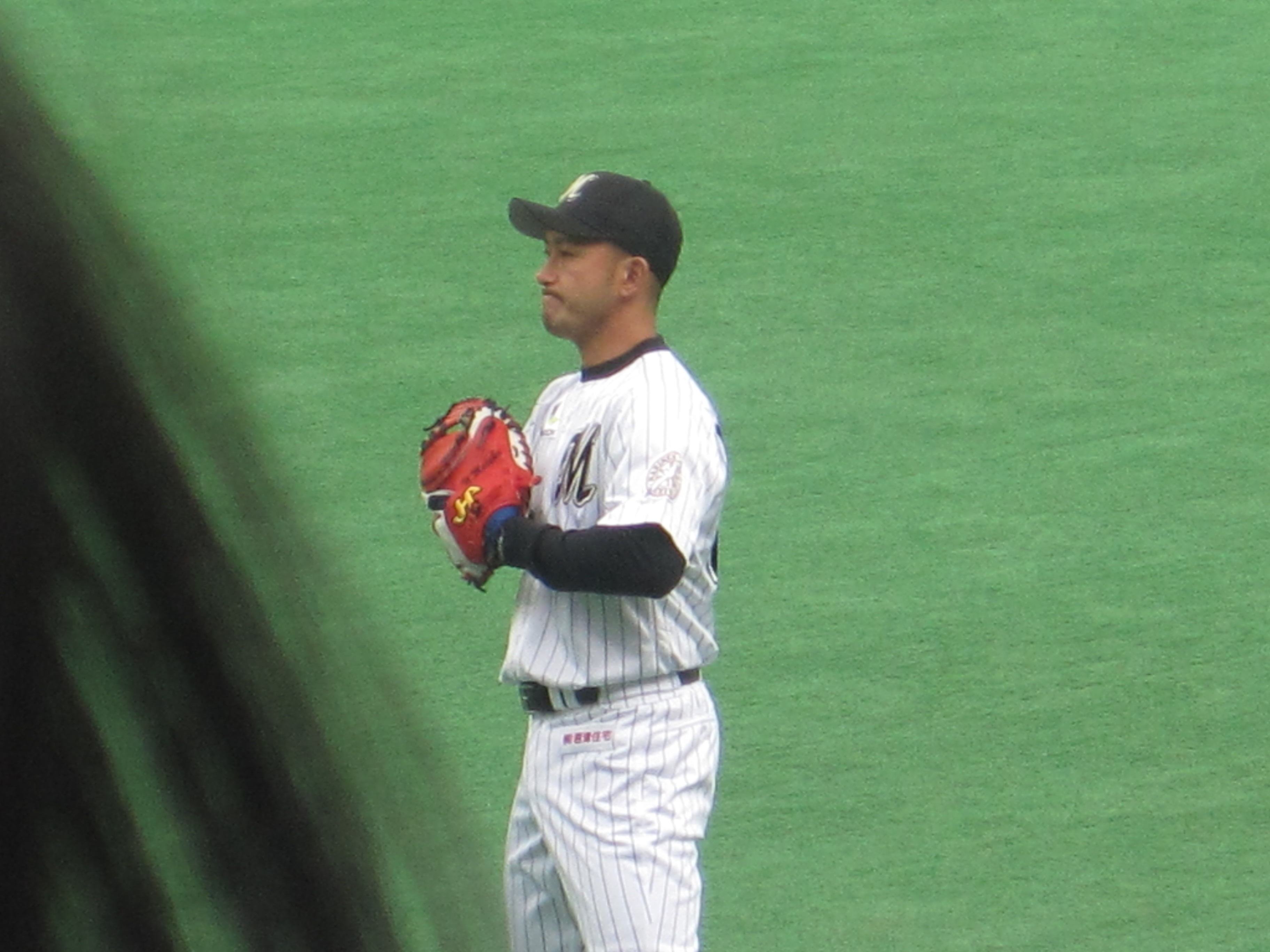 2010年4月24日 千葉マリンスタジアムにて